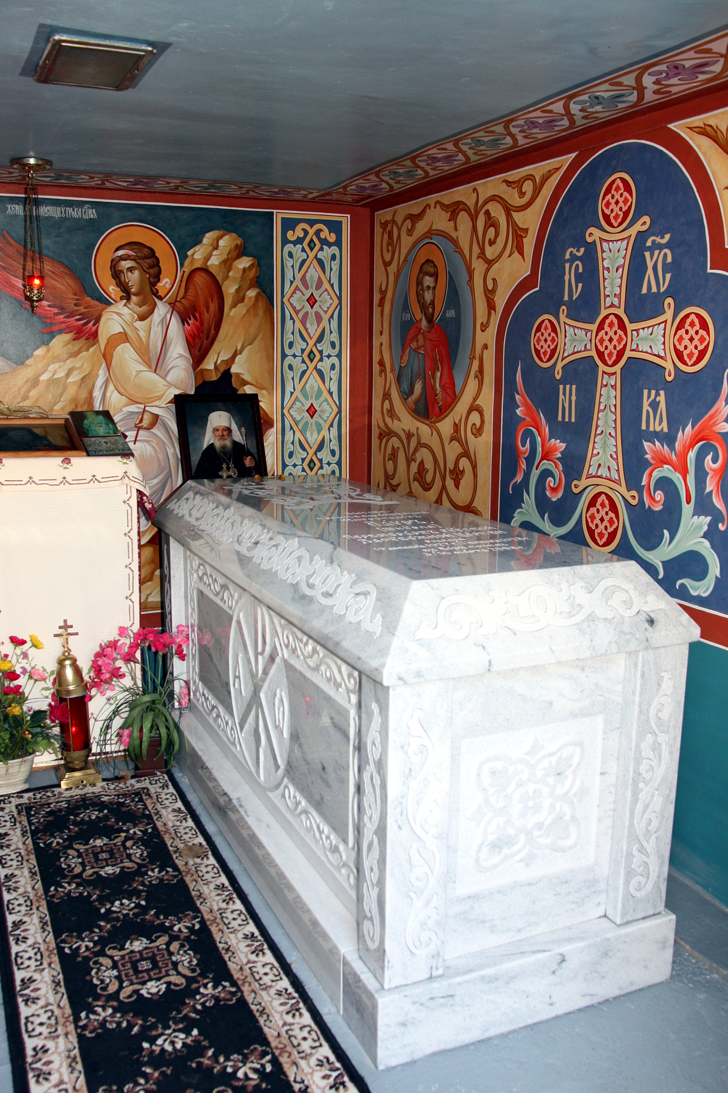 Metropolitan Laurus tomb